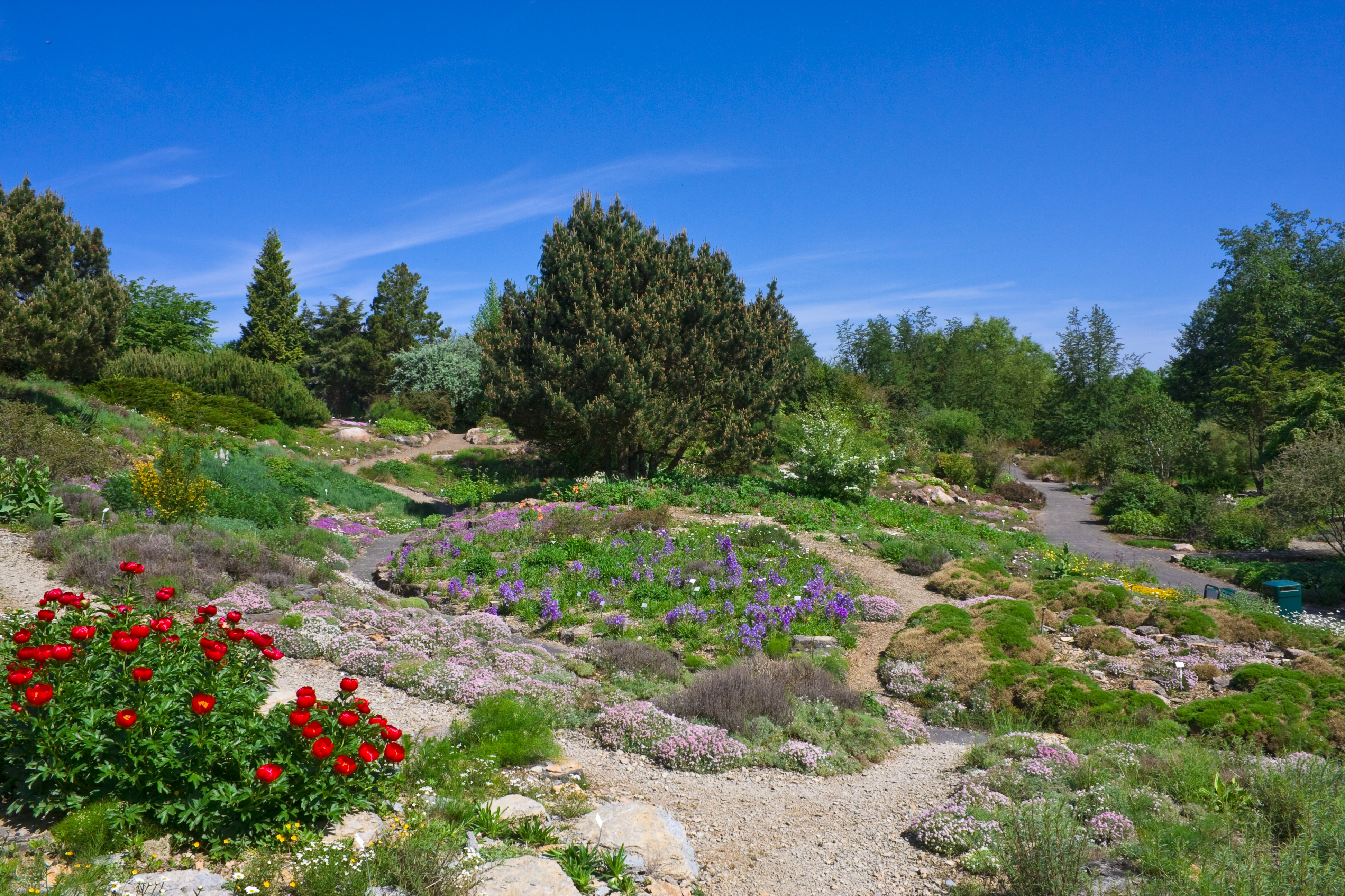 Alpinum im Neuen Botanischen Garten Marburg, Abteilung Westeuropa, die wichtigsten Pflanzen: Bergkiefer (Pinus mugo), Fremdartige Pfingstrose (Paeonia peregrina), Besenginster (Cytisus scoparius), Prächtige Glockenblume (Campanula speciosa)